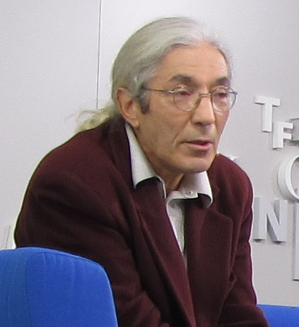 Schriftsteller Boualem Sansal auf dem Blauen Sofa der Frankfurter Buchmesse, sein Buch Rue Darwin vorstellend